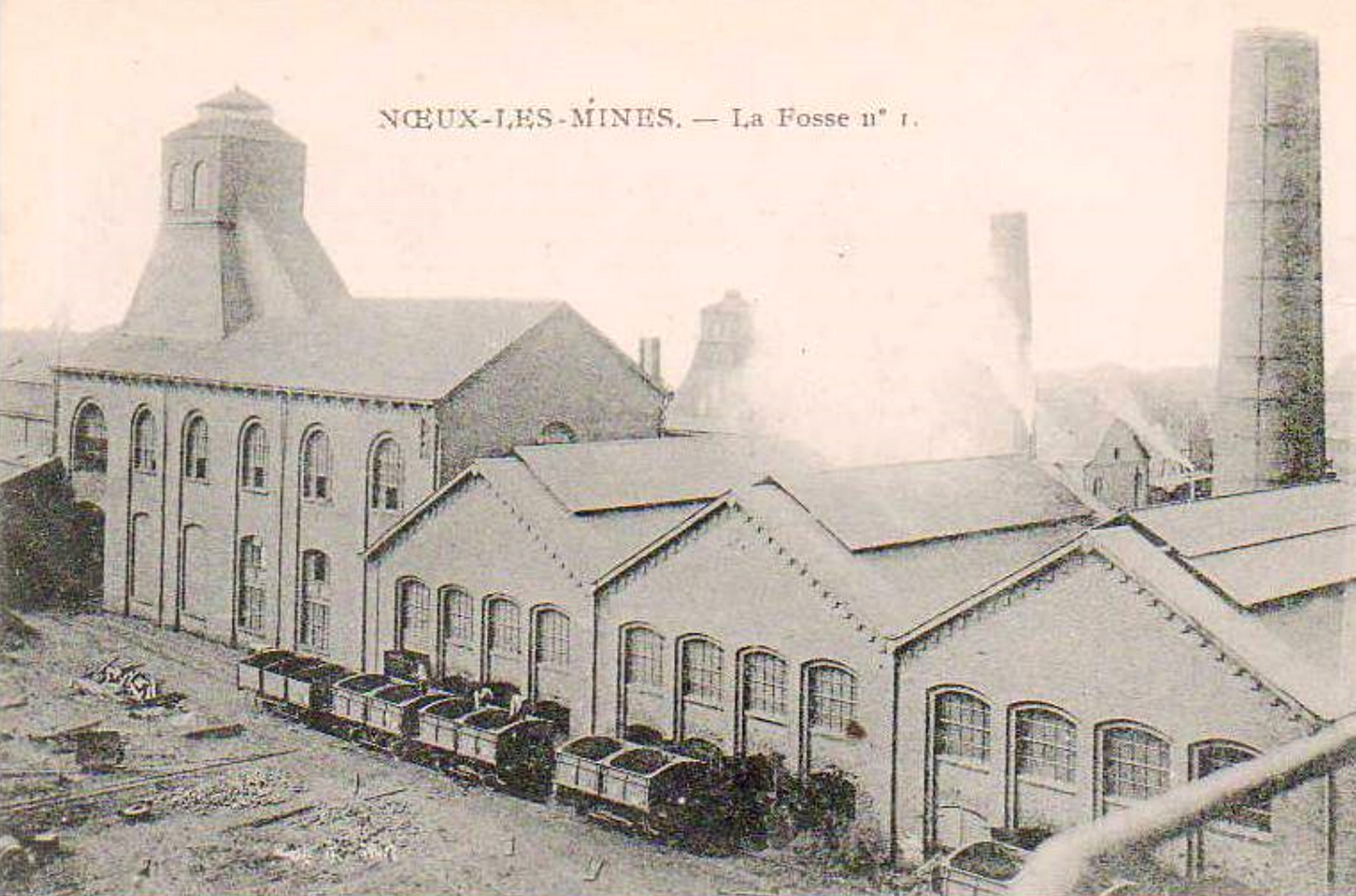 Fosse n° 1 - 1 bis de la Compagnie des mines de Nœux, Nœux-les-Mines, Pas-de-Calais, Nord-Pas-de-Calais, France.